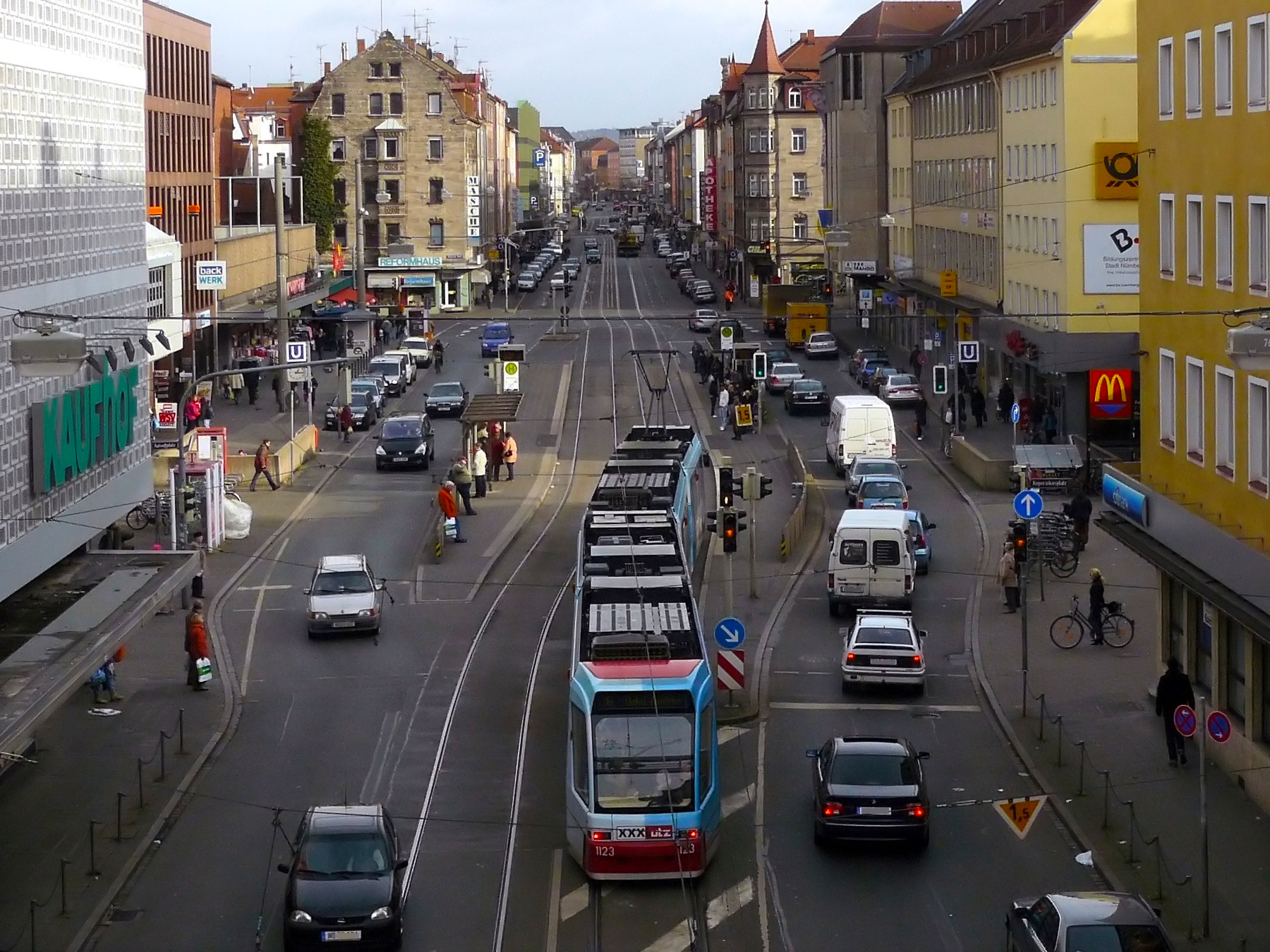 Straßenbahnhaltestelle Aufseßplatz in der Wölckenstraße